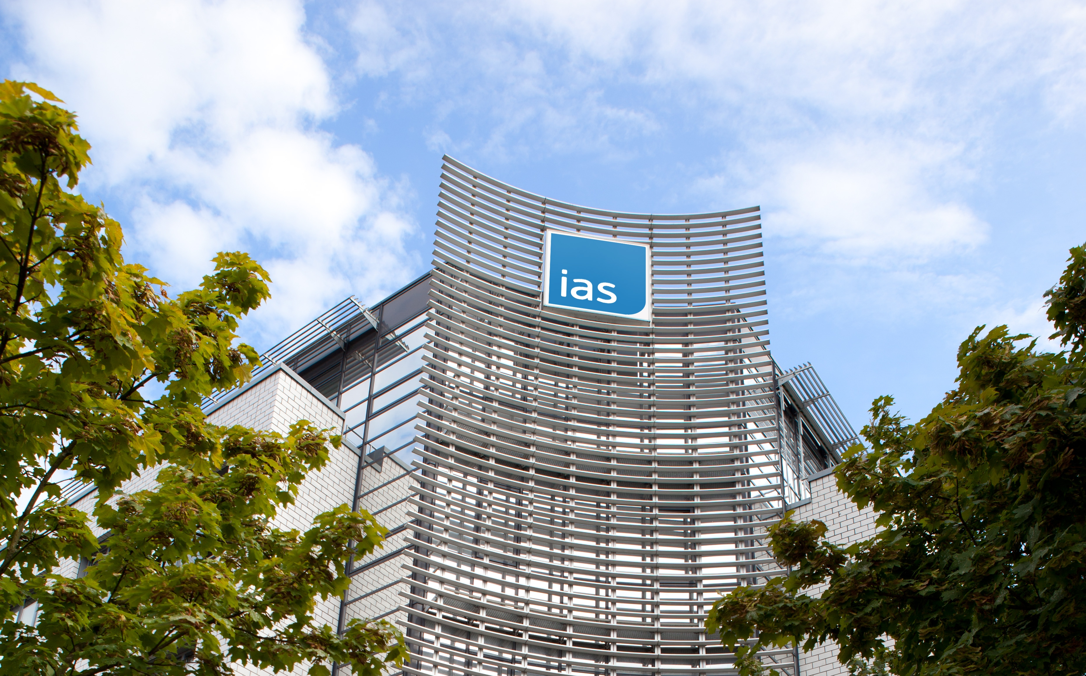 Ias Gebäude in Karlsruhe